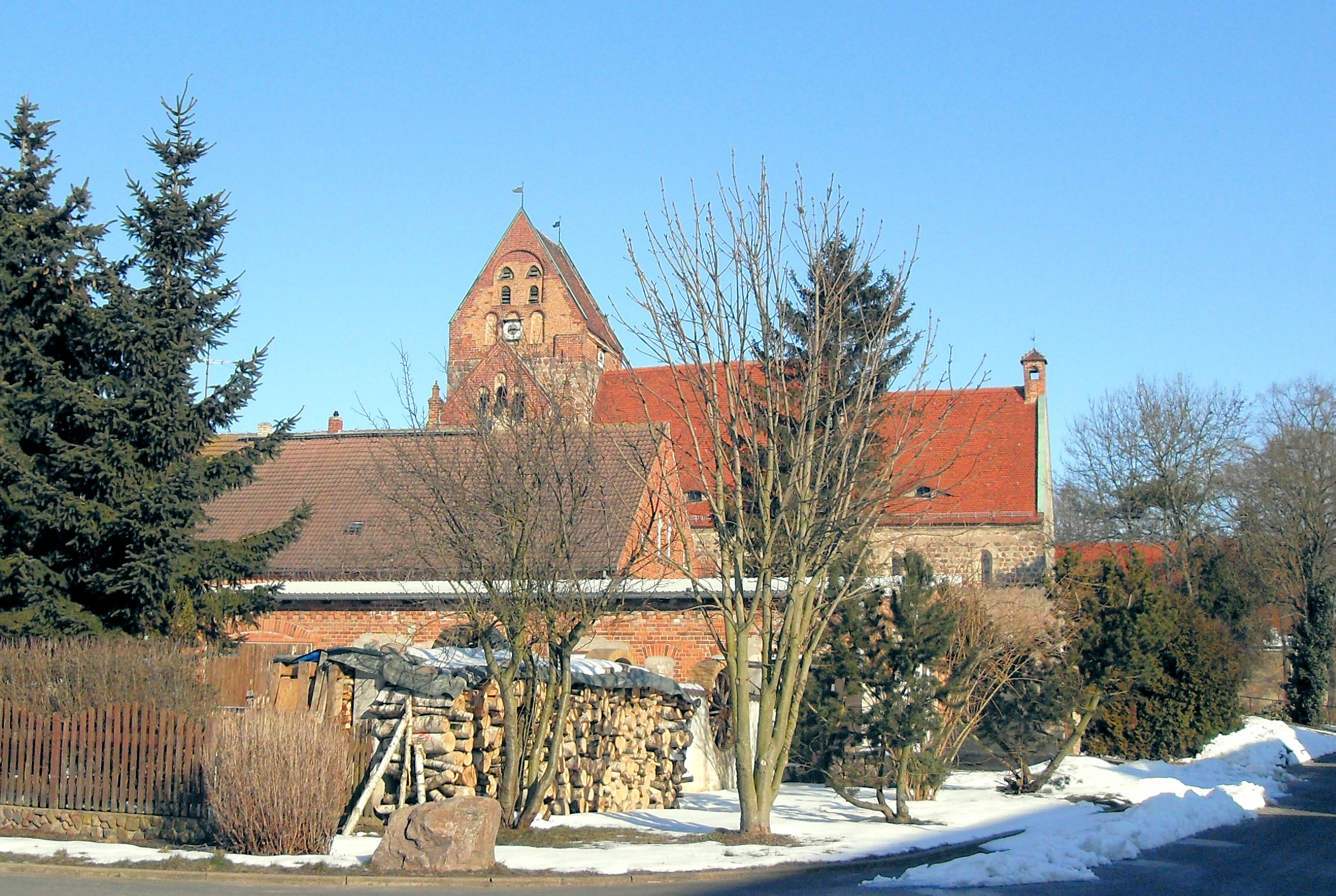 Dorfkirche in Briest (Uckermark)